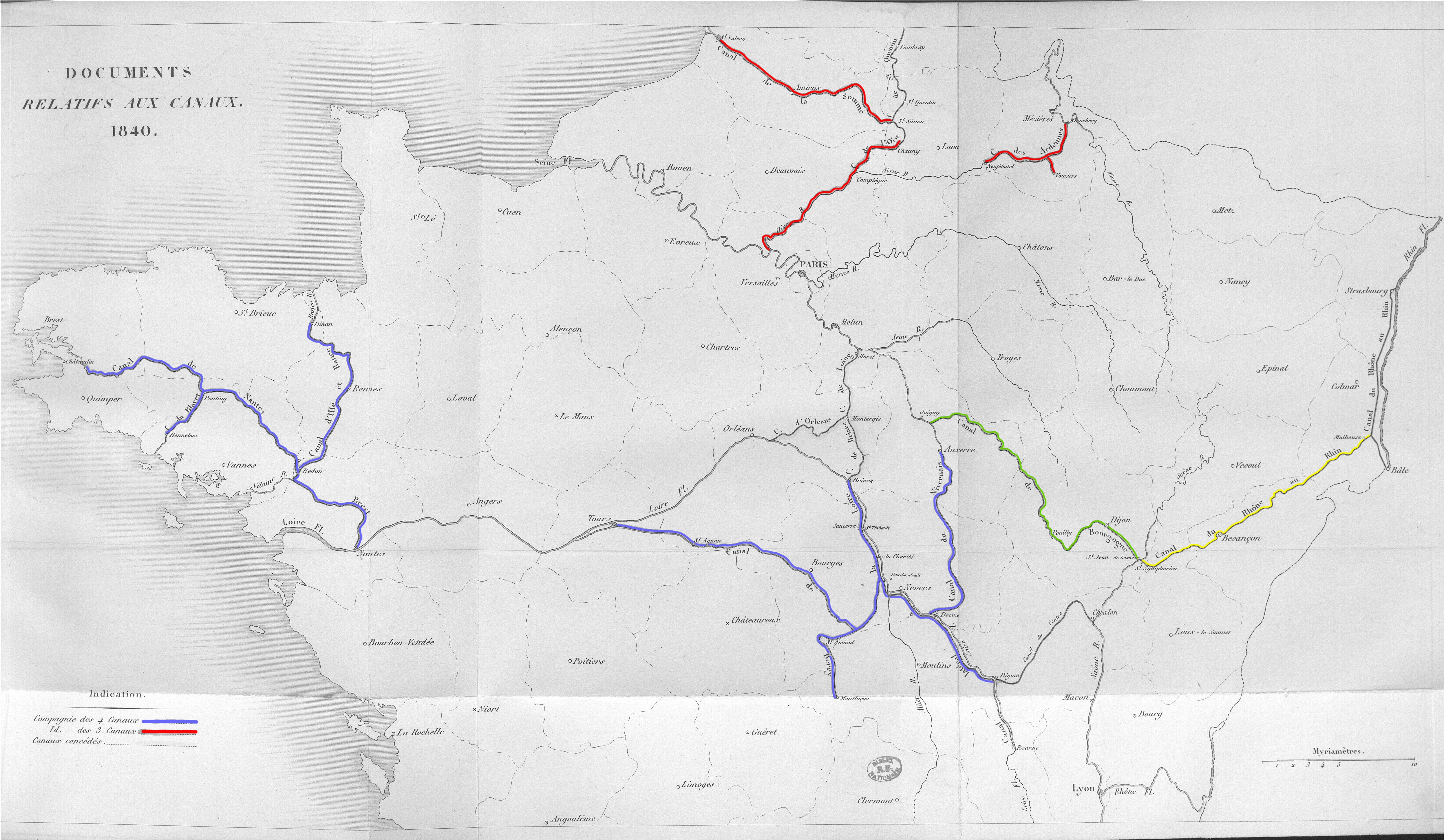 Carte des canaux soumissionnés en 1821 et 1822.